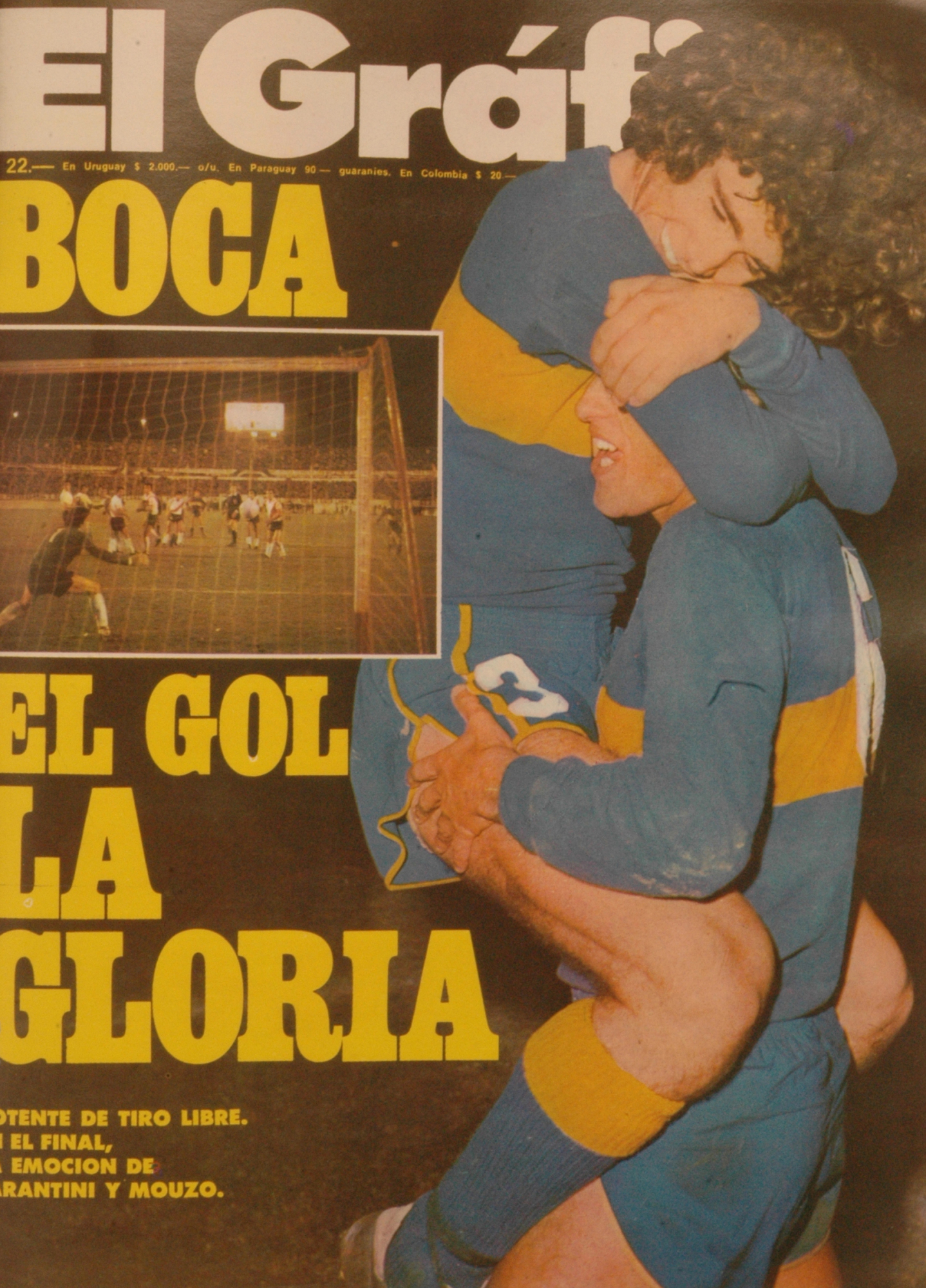 El Grafico del 30 de Julio de 1975. Edicion 2912